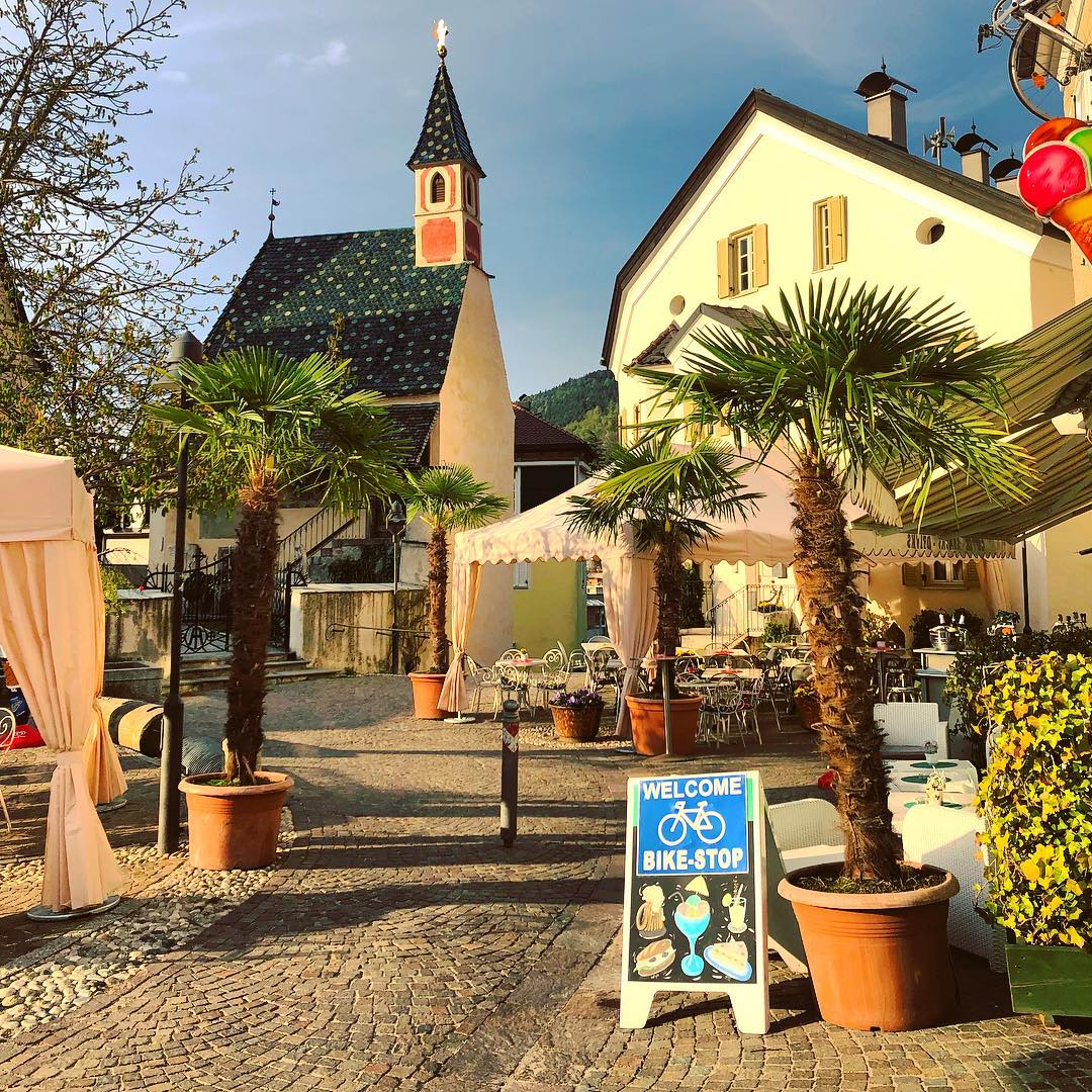 Seit 1611 wird der Kirchplatz vom Hotel Weisse Lilie genutzt um ein einzigartiges Beach-Flair zu kreieren.